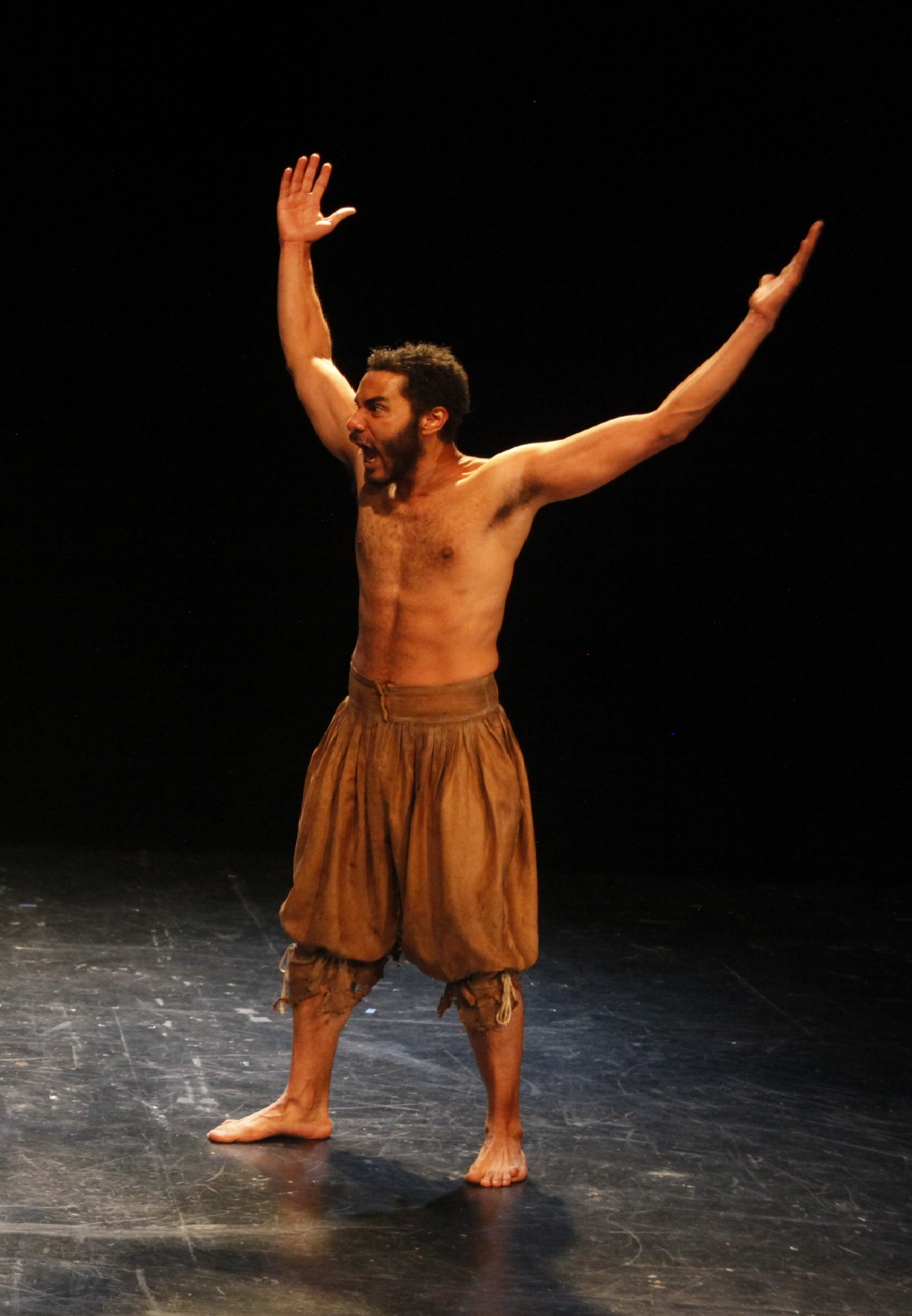 Jesús Delgado como "Yanga" de Jaime Chabaud. Centro Cultural del Bosque, Ciudad de México